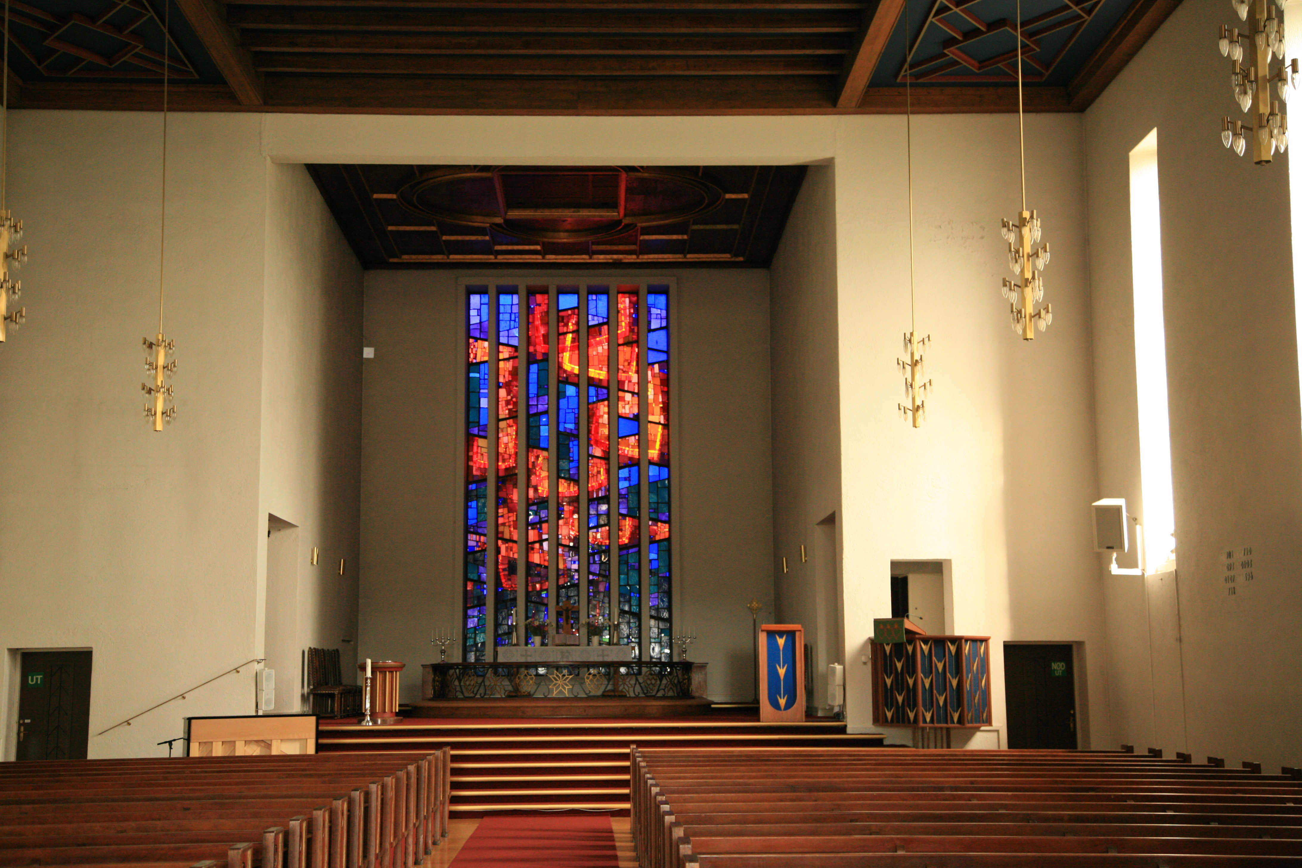 Grefsen church i Oslo, Norway